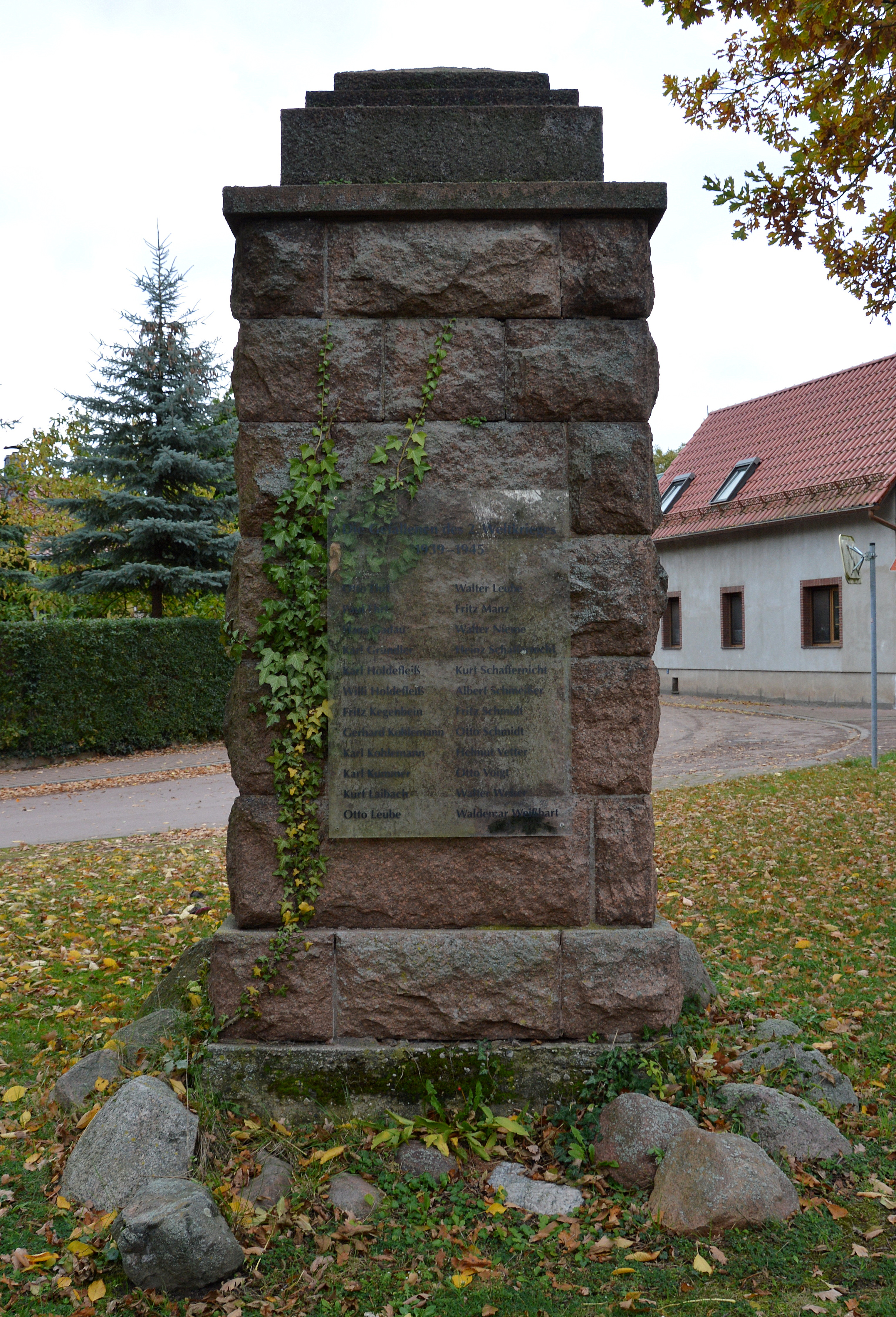 Kriegerdenkmal Kaltenmark